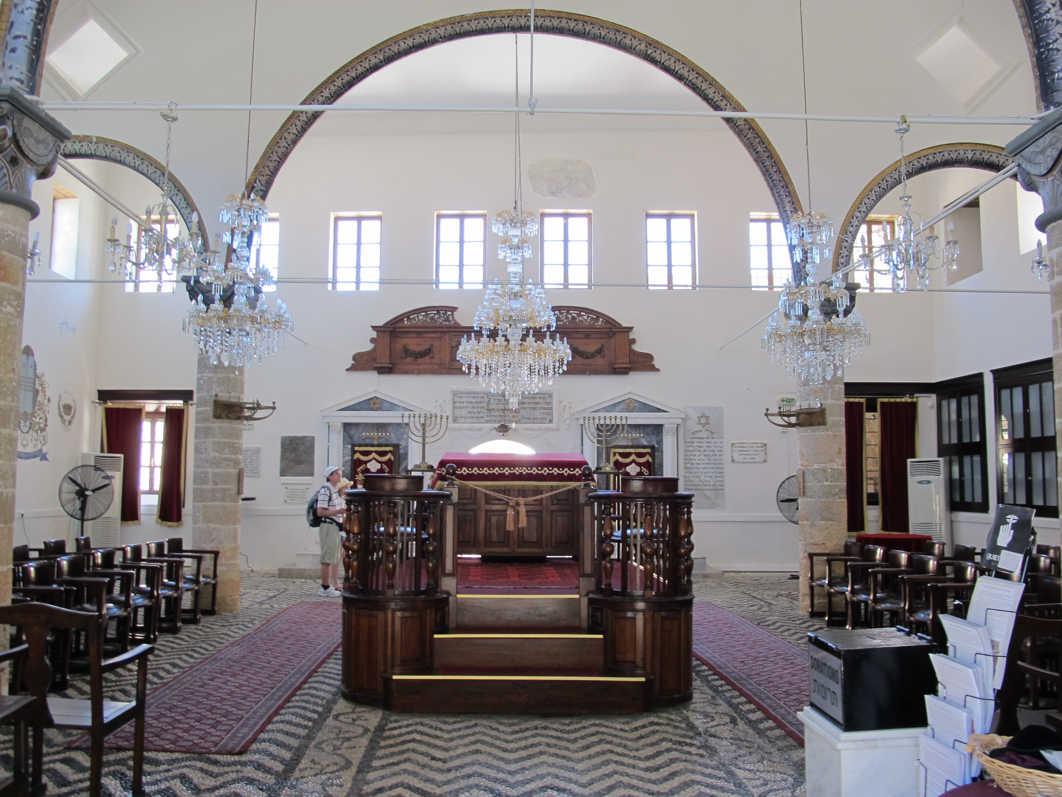 Rosi, Kahal Shalom Synagogue, int.